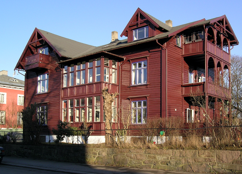 Nordraaks gate 15, Oslo. Built 1892; architect Carl Konopka.